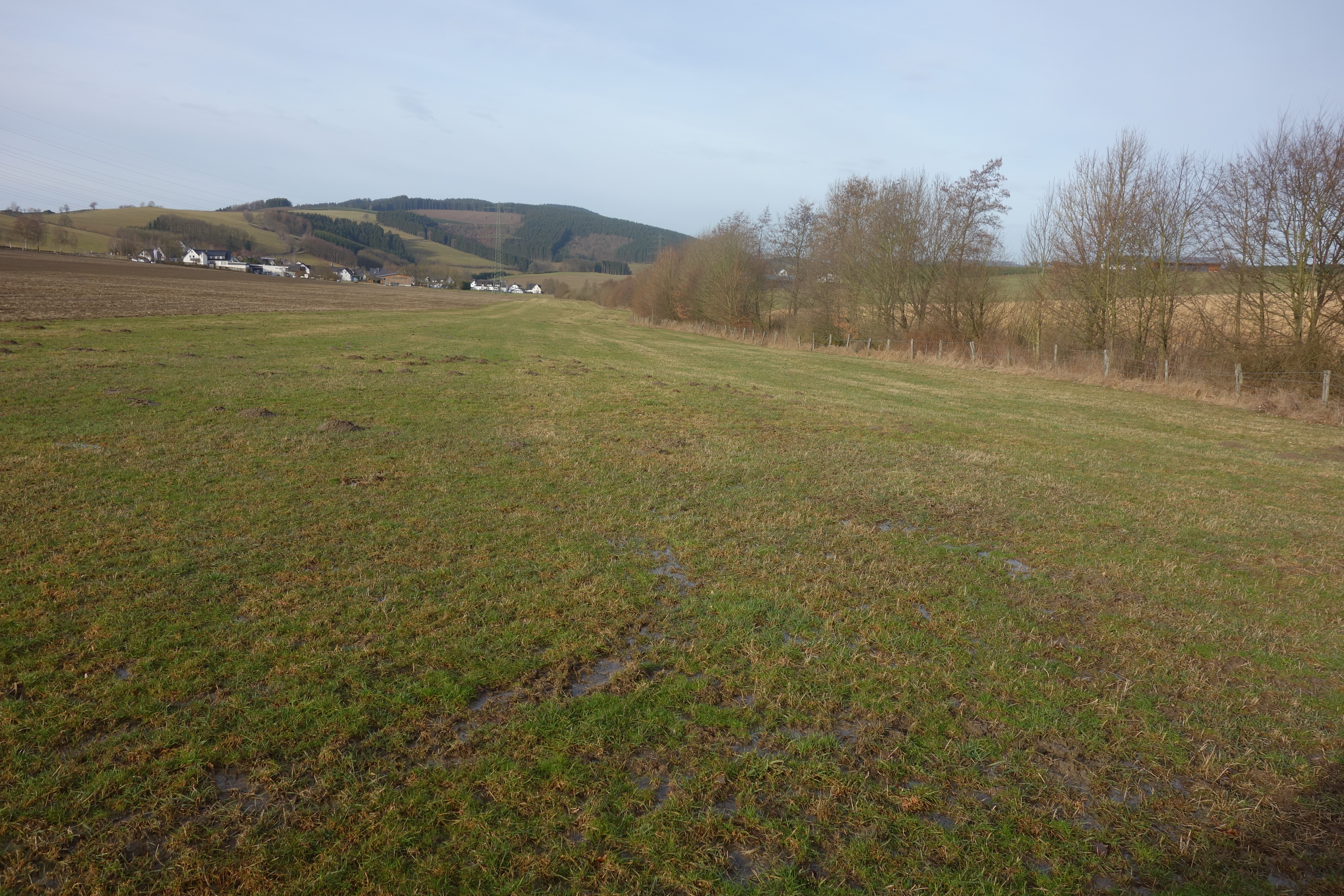 Landschaftsschutzgebiet Werde, Selkentroper Bach und Wehrsiepen zwischen Werpe und Selkentrop und Oberberndorf rechts vom Acker.